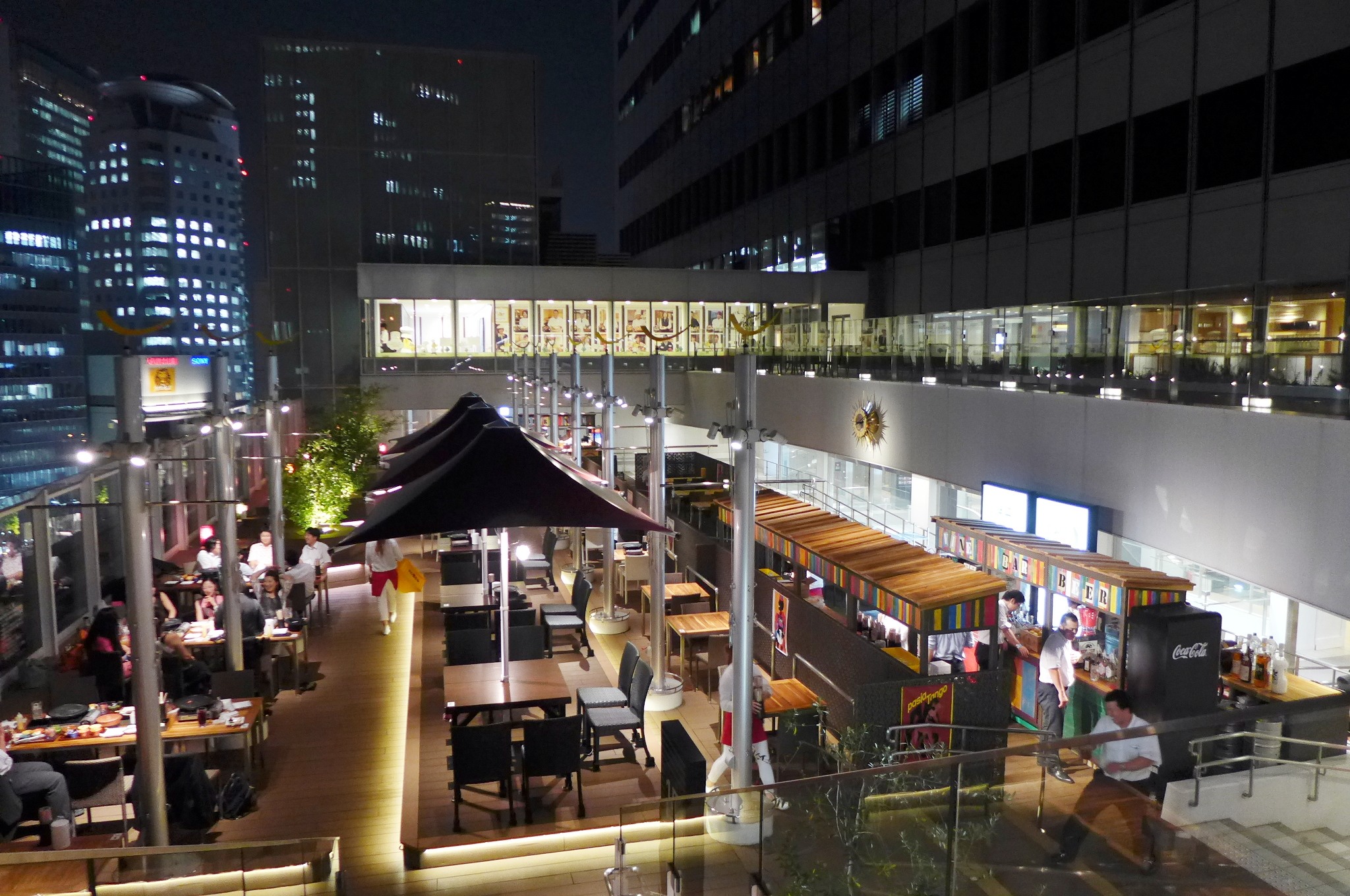 サウスゲートビルディング 太陽の広場